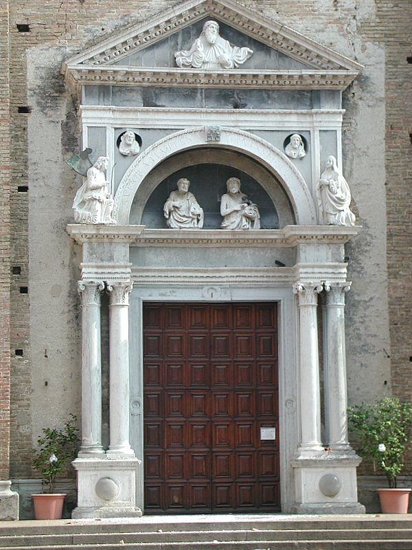 La porta del Duomo Santa Maria Annunziata di Salò